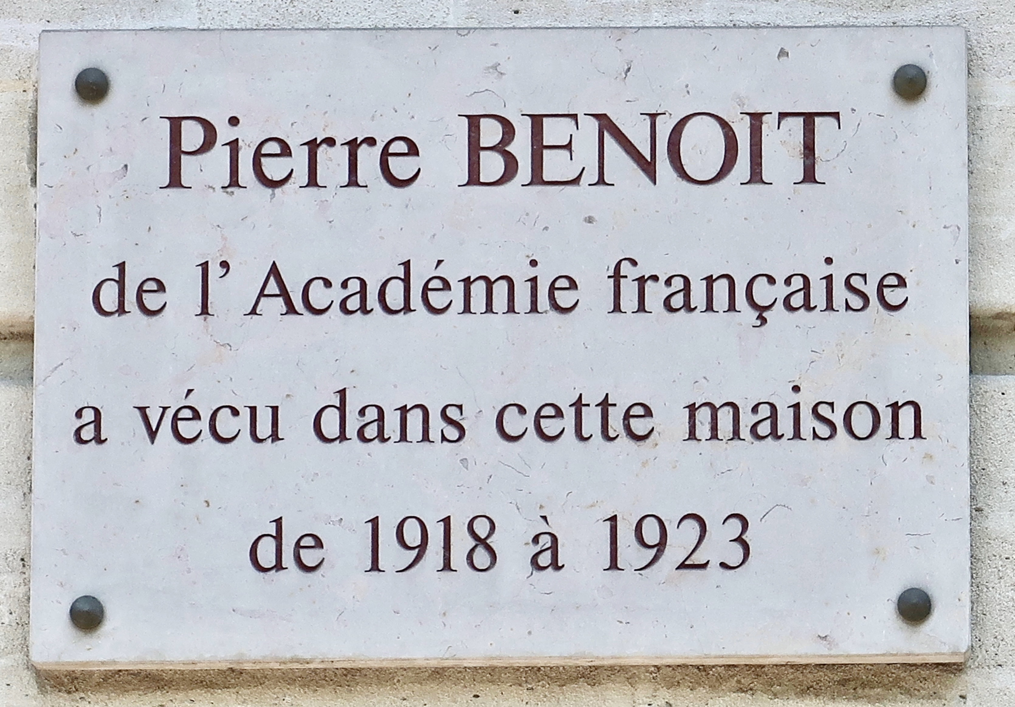 Plaque en hommage à Pierre Benoît, 207 boulevard Raspail (Paris 14e).